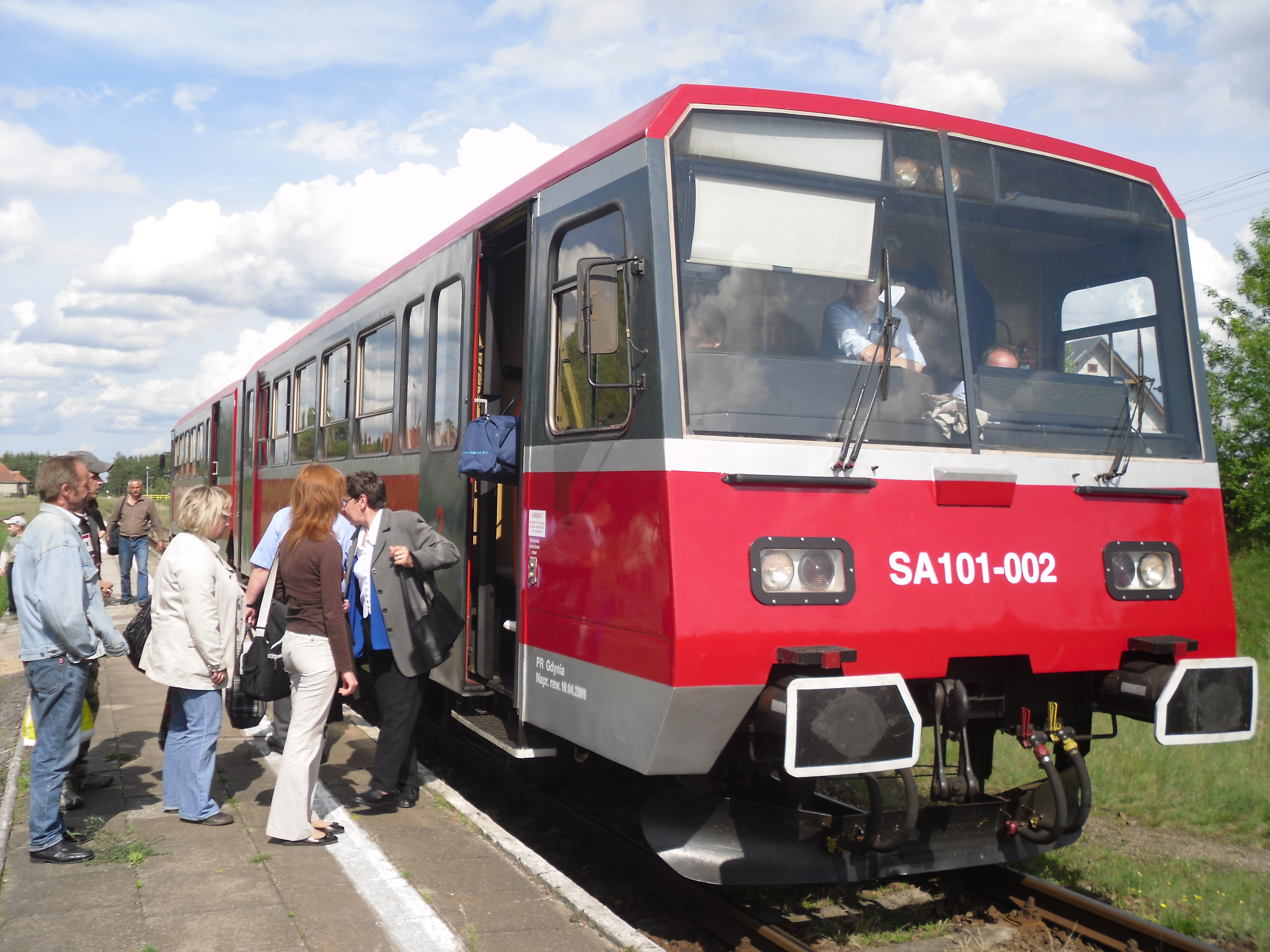 SA101-002 na stacji Karsin.